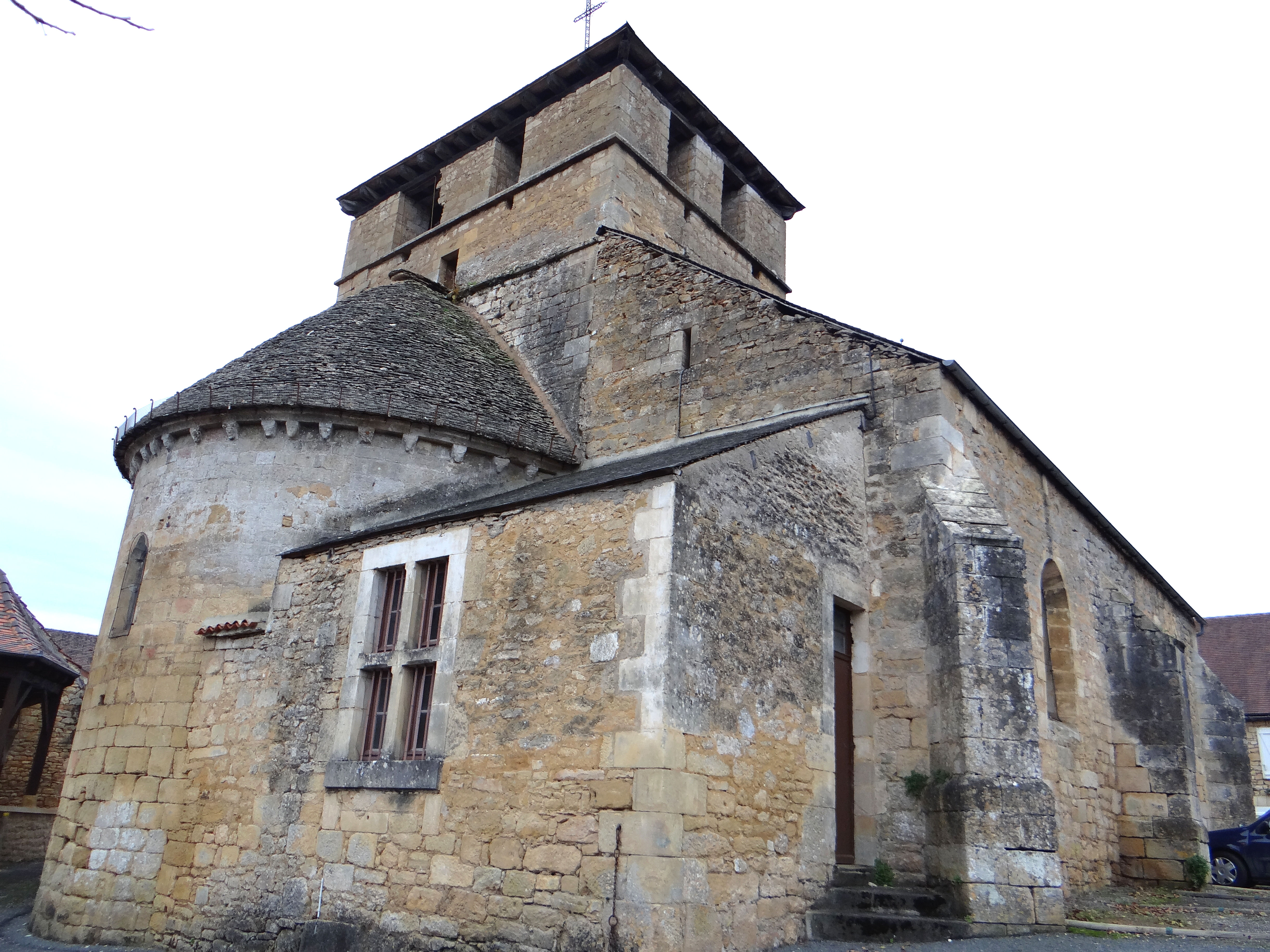 Veyrignac - Église Saint-Pierre-ès-Liens - Chevet